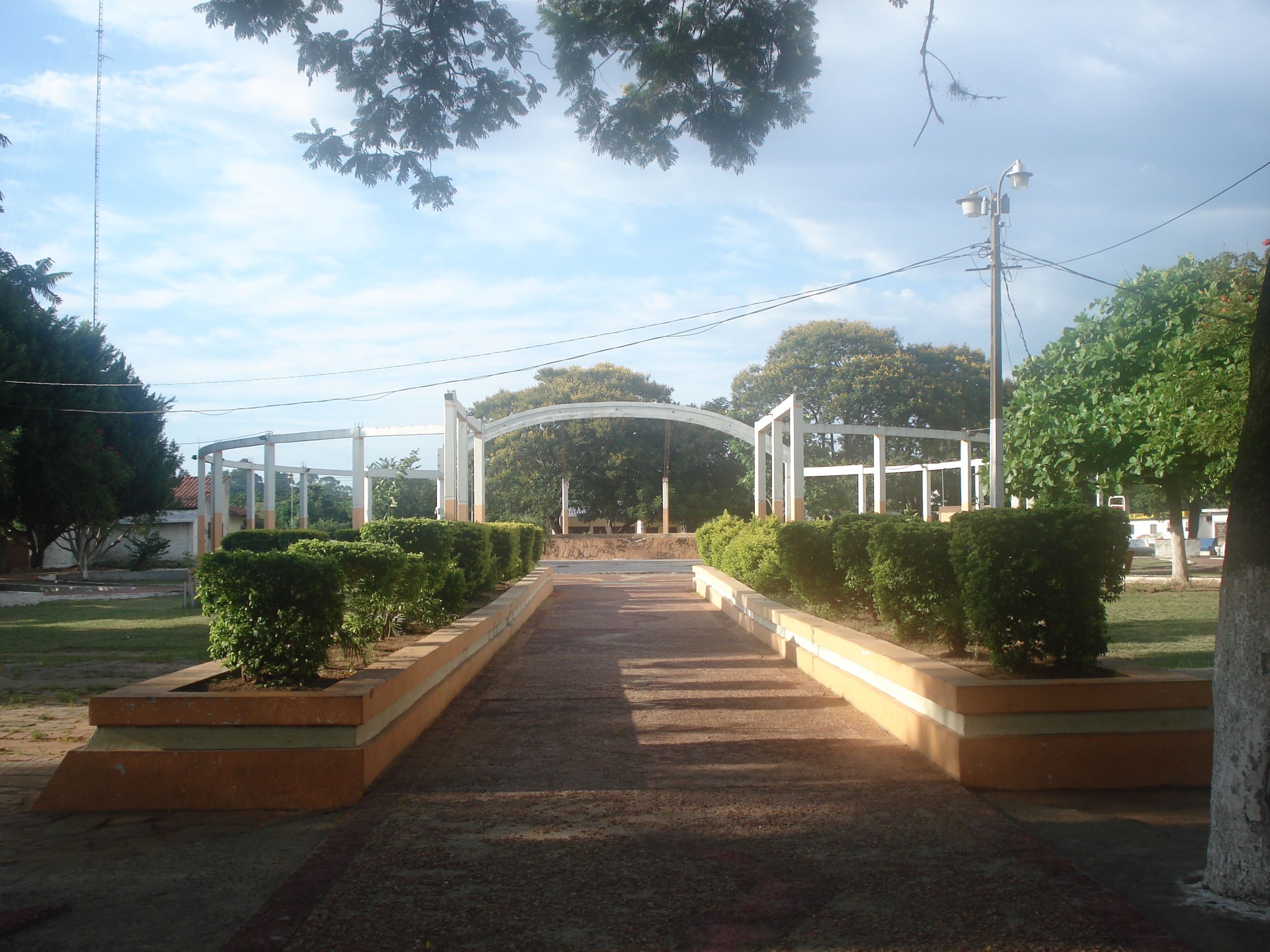 fachada